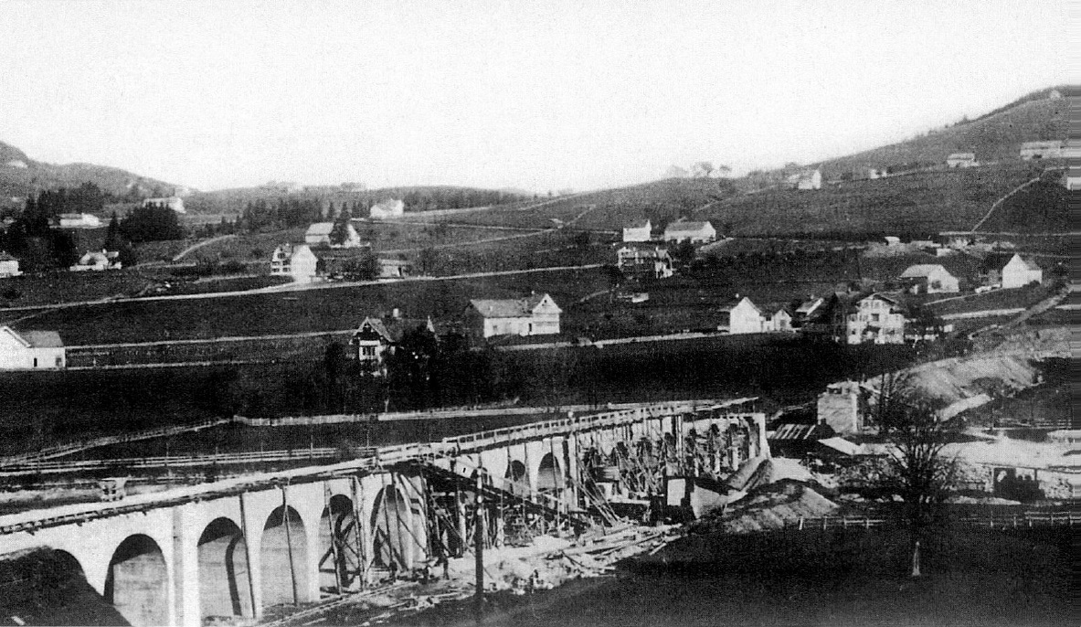 Der 297 m lange Sitterviadukt bei Appenzell war bis 2010 die längste schmalspurige Bahnbrücke. Hier steht er kurz vor der Vollendung, es fehlt noch das Verbindungsstück über die Sitter.